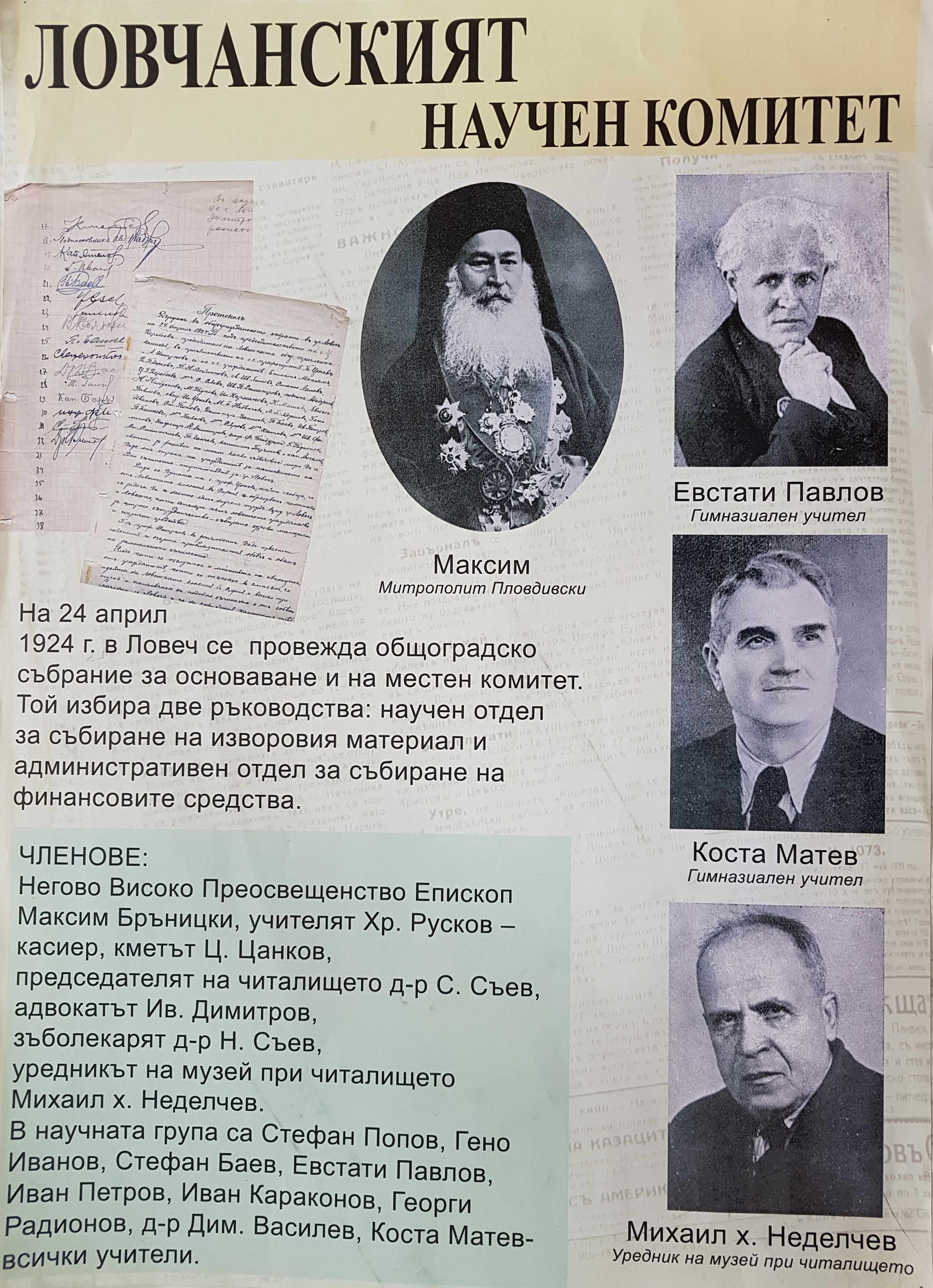 Изложбено табло за Ловчанския научен комитет във фонд Краезнание при Регионална библиотека „Проф. Беню Цонев“ – Ловеч.